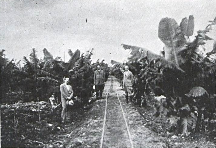 Companhia Agricola Bom Retiro (1931)